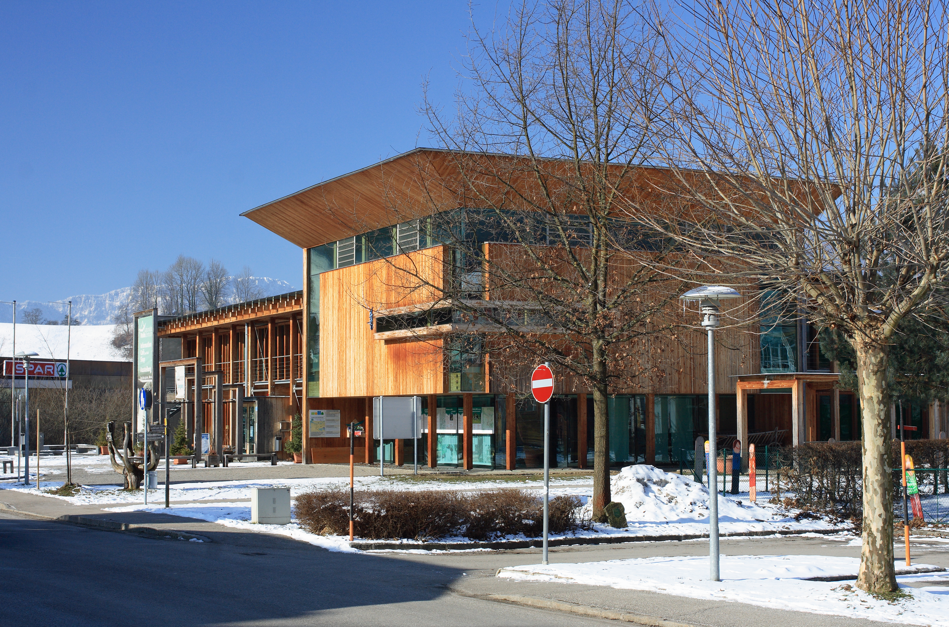 Das im Jahr 2001 eröffnete Nationalpark-Zentrum in Molln (Oberösterreich)